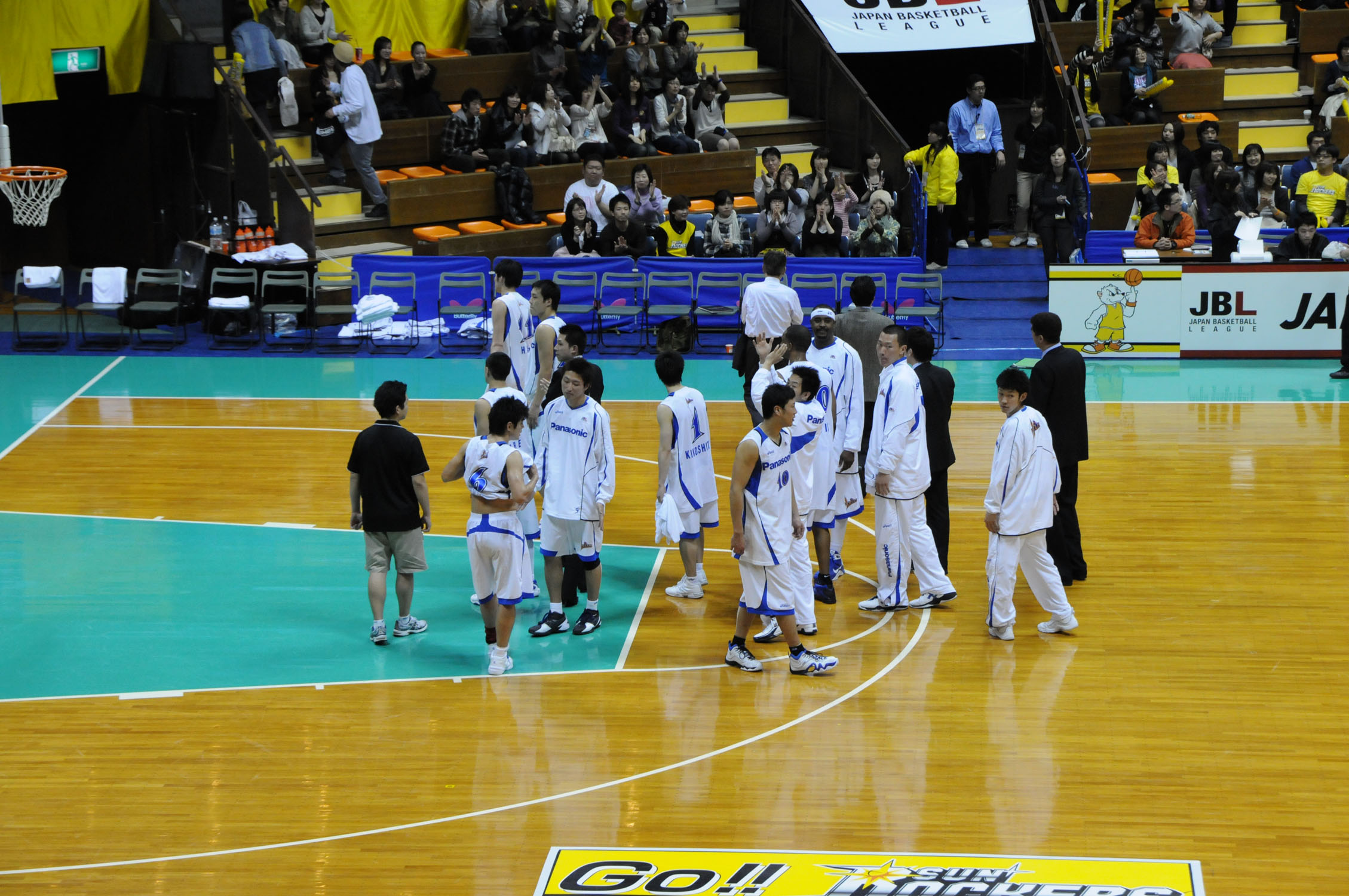 パナソニックトライアンズ、代々木第二体育館で。